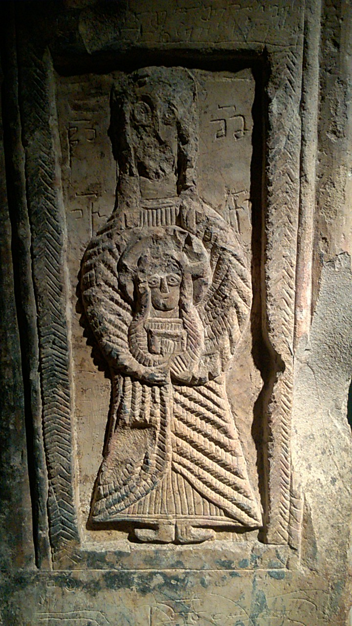 დავათის ორნავიანი ეკლესია